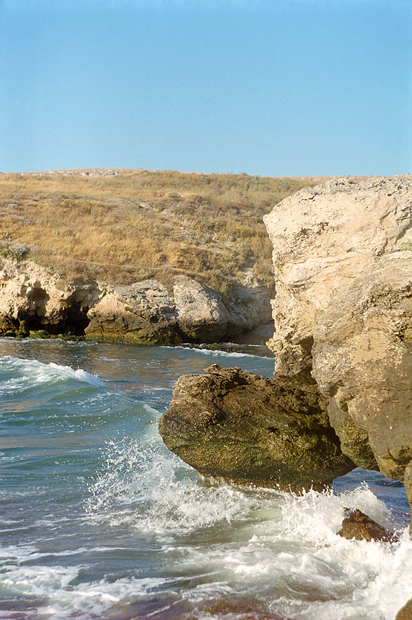 Прибрежная полоса мыса Казантип